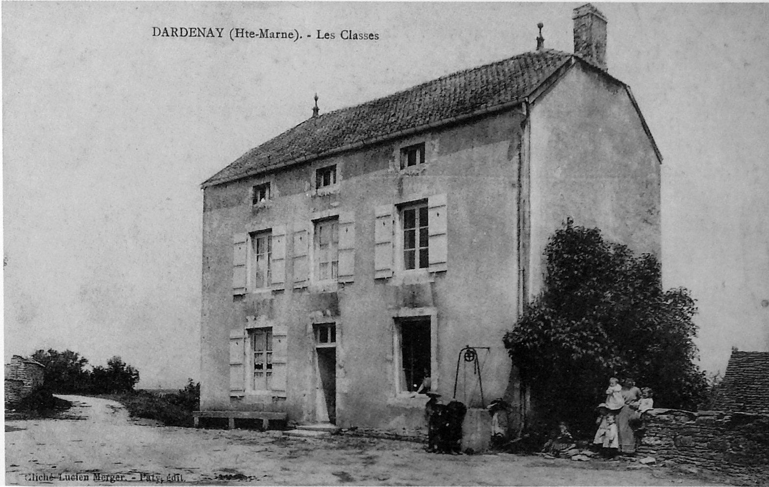 par une vue ancienne.